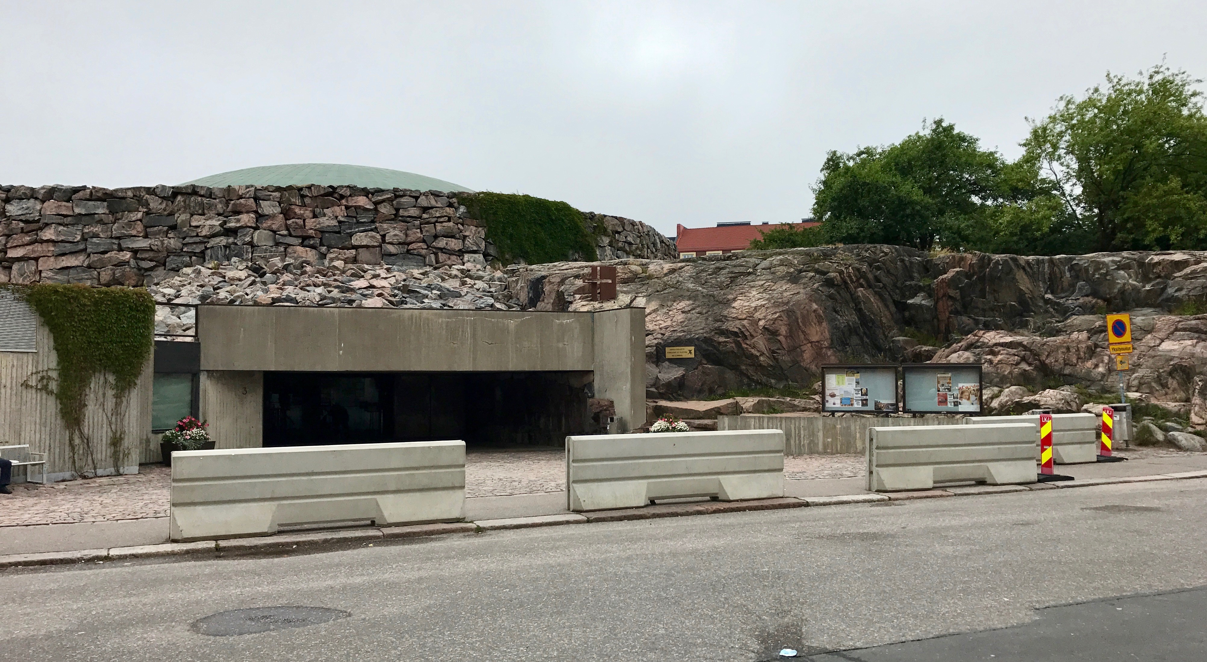 Temppeliaukion kirkon betoniesteet sisäänkäynnin edessä. Keskusrikospoliisi epäili kesäkuussa 2017, että kirkkoon on suunnitteilla terrori-isku, jonka vuoksi esteet tuotiin sisäänkäynnin eteen.